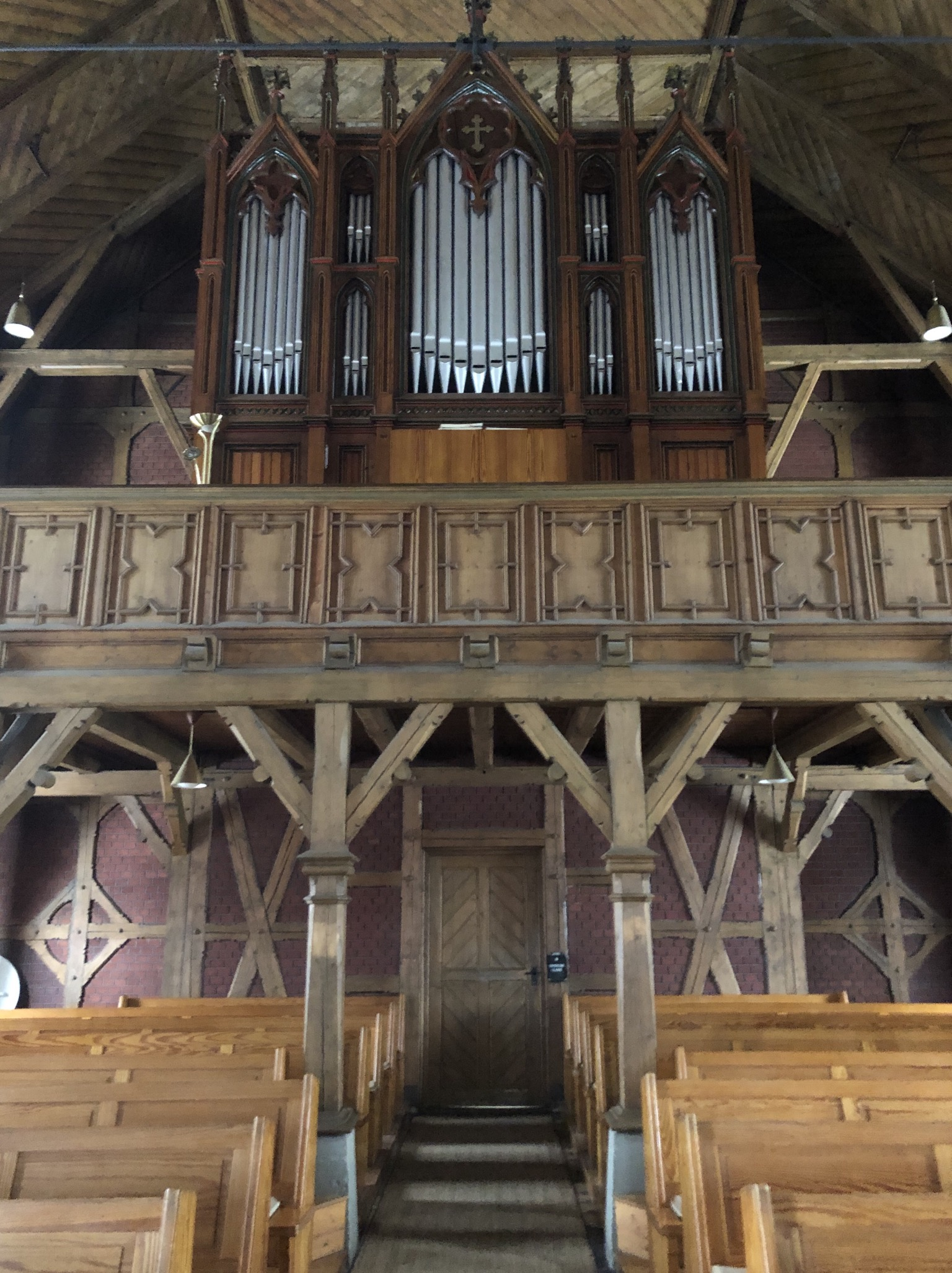 Trinitatiskirche in Braunlage Orgel